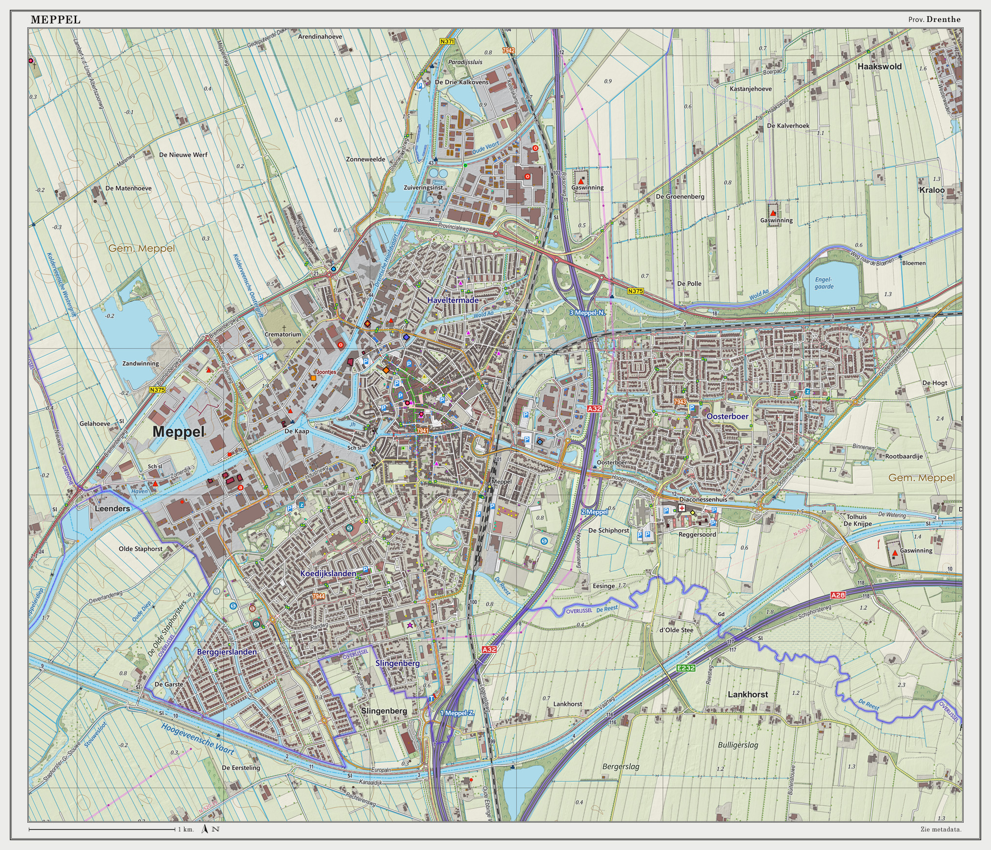 Topografische kaart van Meppel (woonplaats). Resolutie: 300 pixels/km. Kaartbeeld samengesteld uit de open geodata van de Top10NL en Top25namen (Basisregistratie Topografie, Kadaster), Creative Commons BY licentie. Gebouwvlakken uit open geodata BAG extract. Wegen uit de OpenStreetMap. Reliëfschaduw uit de Actuele Hoogtekaart AHN2. Samenstelling en kleurenschema: Jan-Willem van Aalst, met QGIS2. Zie ook de Legenda.